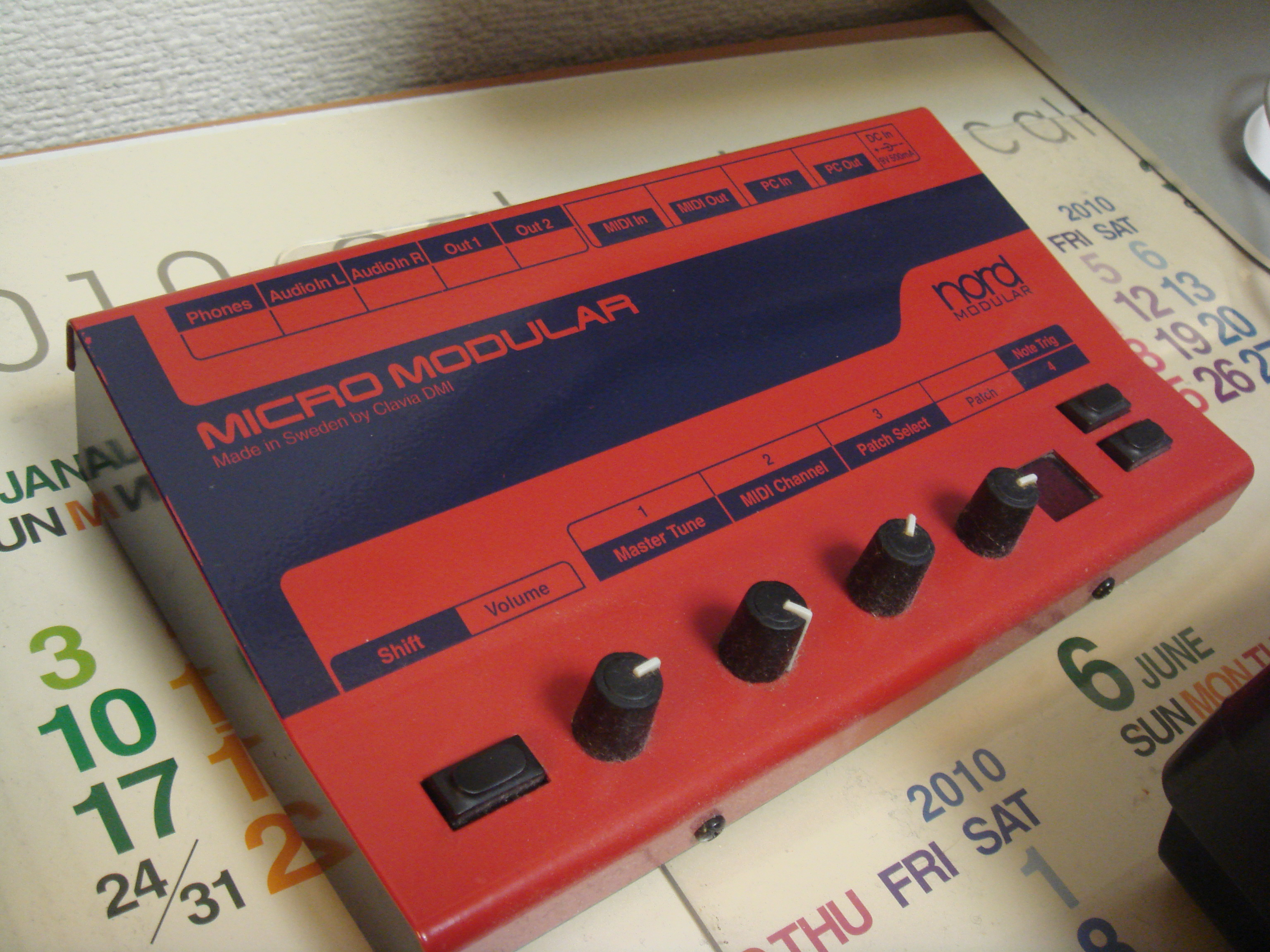 Clavia Nord Micro Modular